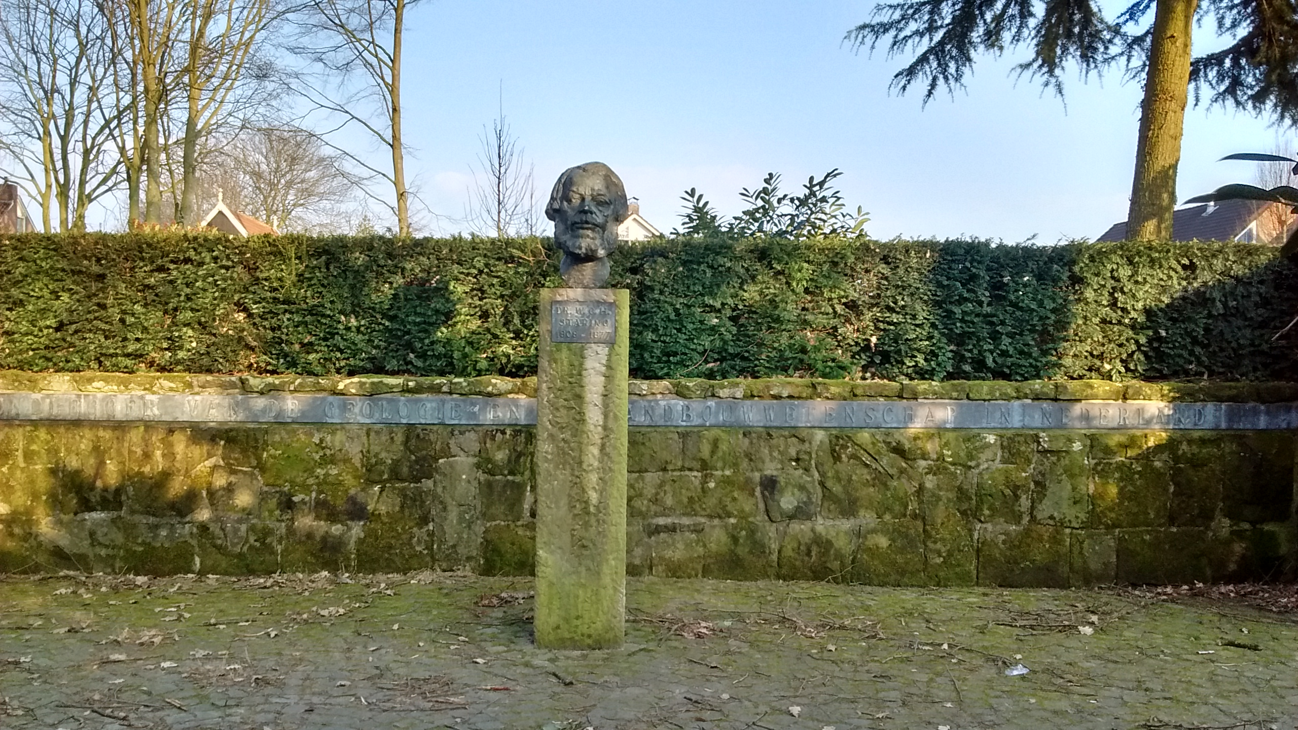 dr W.C.H. Staring 1808-1873; naast Staringgroeve in Losser, tekst achtergrond: GRONDLEGGER VAN DE GEOLOGIE EN LANDBOUWWETENSCHAP IN NEDERLAND